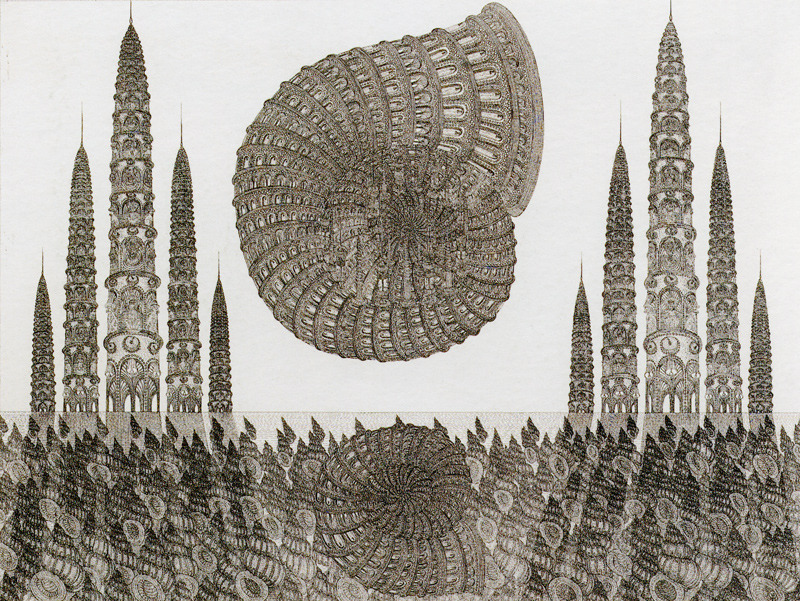 graphic art by Vello Vinn